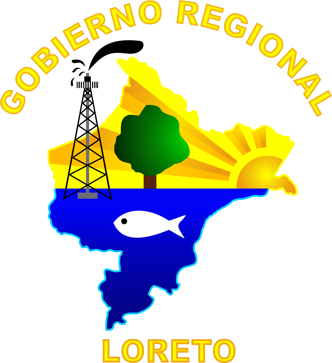 Región Loreto